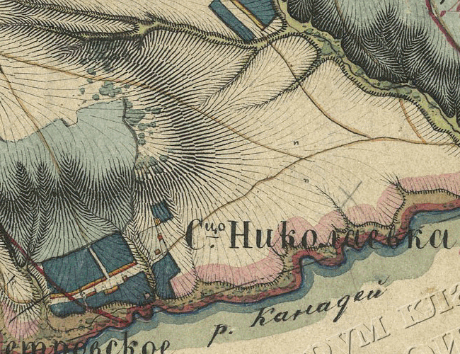 Сельцо Николаевка на одноверстной карте Менде Симбирской губернии 1861 г.